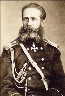 Ио́сиф Влади́мирович Гу́рко (Роме́йко-Гу́рко) (16 (28) июля 1828 — 15 (28) января 1901) — русский генерал-фельдмаршал, наиболее известный благодаря своим победам в русско-турецкой войне 1877—1878 гг.